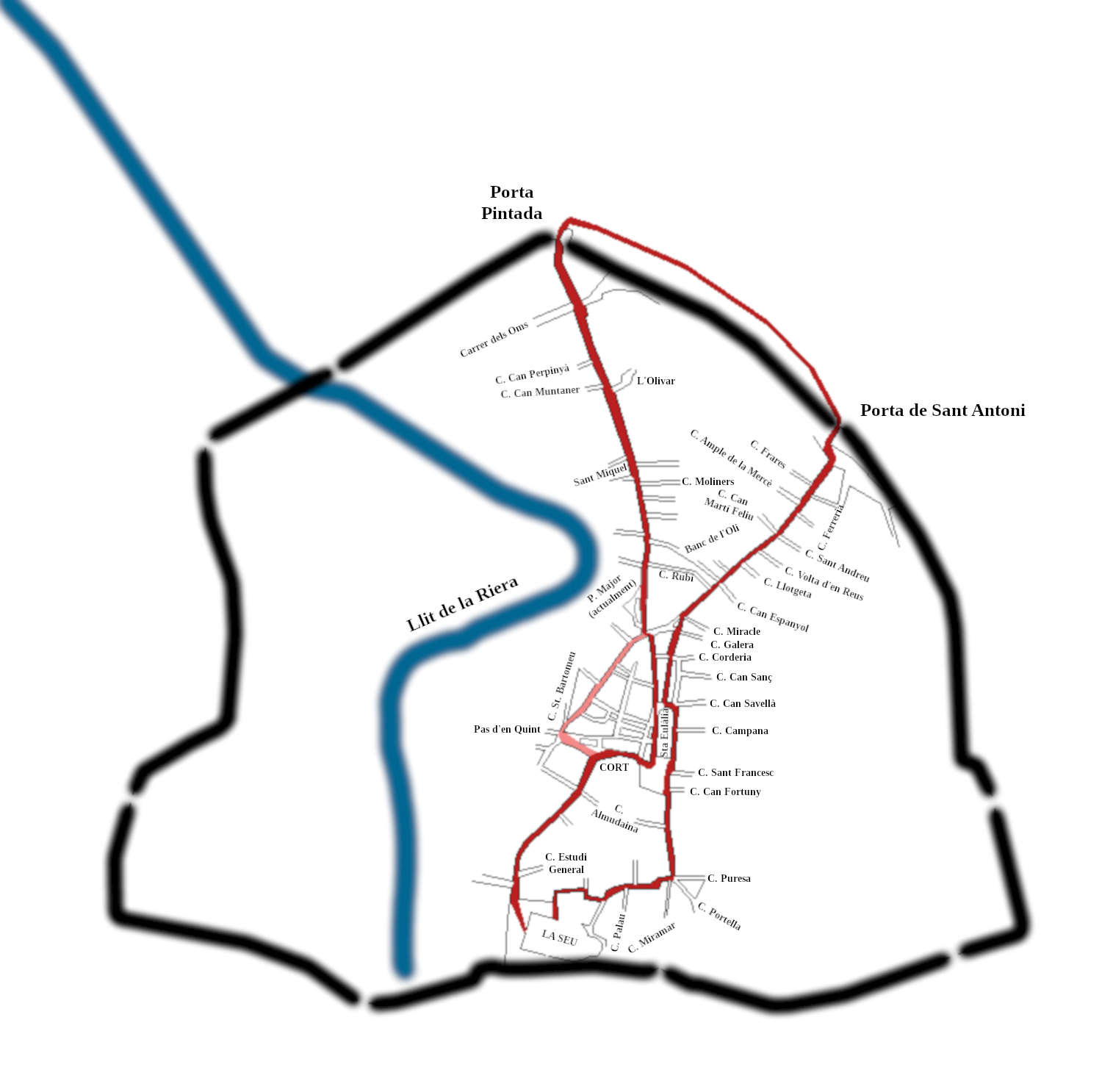 Aquest és el recorregut que feia la processó de l'Estendard fins que es varen bastir les noves murades renaixentistes (s. XVI). Sortia de la Seu pel portal de l'Almoina, anava cap al carrer d'en Morei, per Santa Eulària i pel carrer del Sindicat, sortia per la Porta de Sant Antoni, entrava per la Porta Pintada (la mateixa per on entrà el Rei en Jaume quan conquerí la ciutat) i davallava pel carrer de Sant Miquel, on es deia una missa a l'església. Continuava la processó pel carrer de l'Argenteria, per bé que de vegades anava pel carrer dels Bastaixos, i, a Cort, anava pel carrer de Palau Reial fins a dins la Seu. Informació extreta d'Alomar, Antoni I., L'Estendard, la festa nacional més antiga d'Europa, Palma: Documenta Balear, 1998.